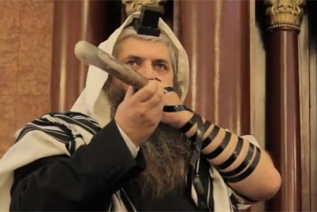 фотографія рабина Київа та України